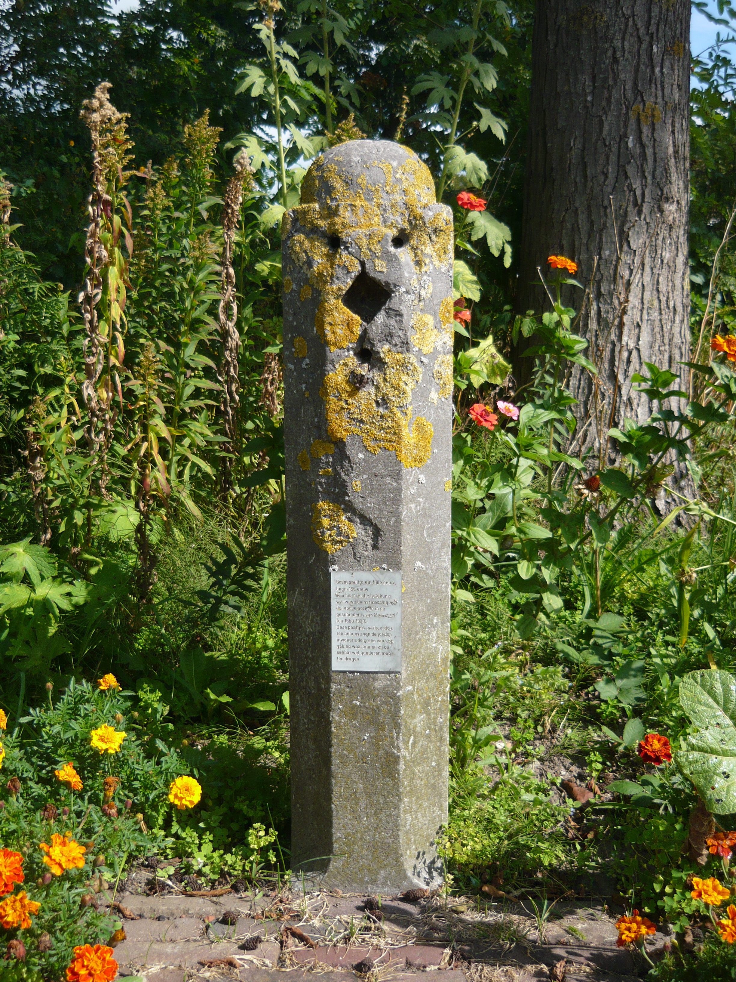 "Jodenpaaltje" uit ca. 1800 langs de Vecht bij Zandweg 29 in Maarssen, een grensmarkering vormend in relatie met de sabbat